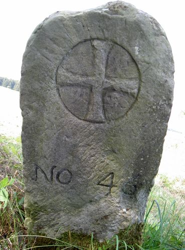 Grenzstein No. 46 mit dem bischhöflichen Kreuz. Siehe Lippspringischer Originalvergleich.